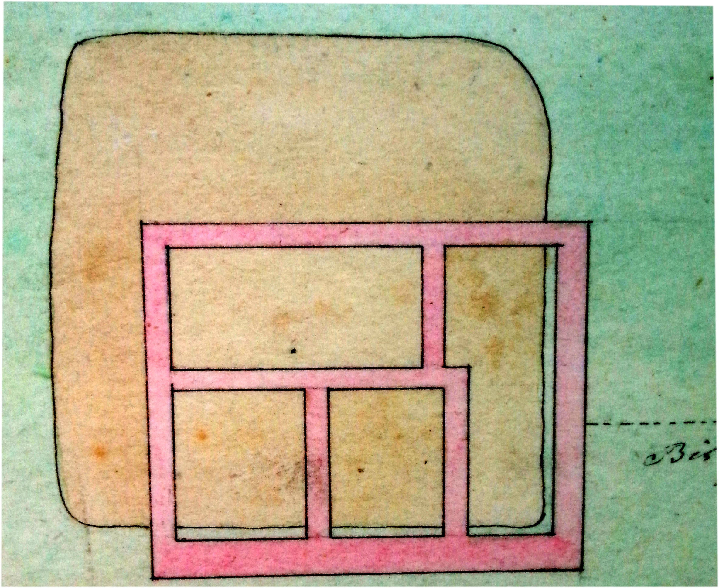 Befundskizze des Gebäude Ost, Kleinkastell Schlögen (Ioviacum).